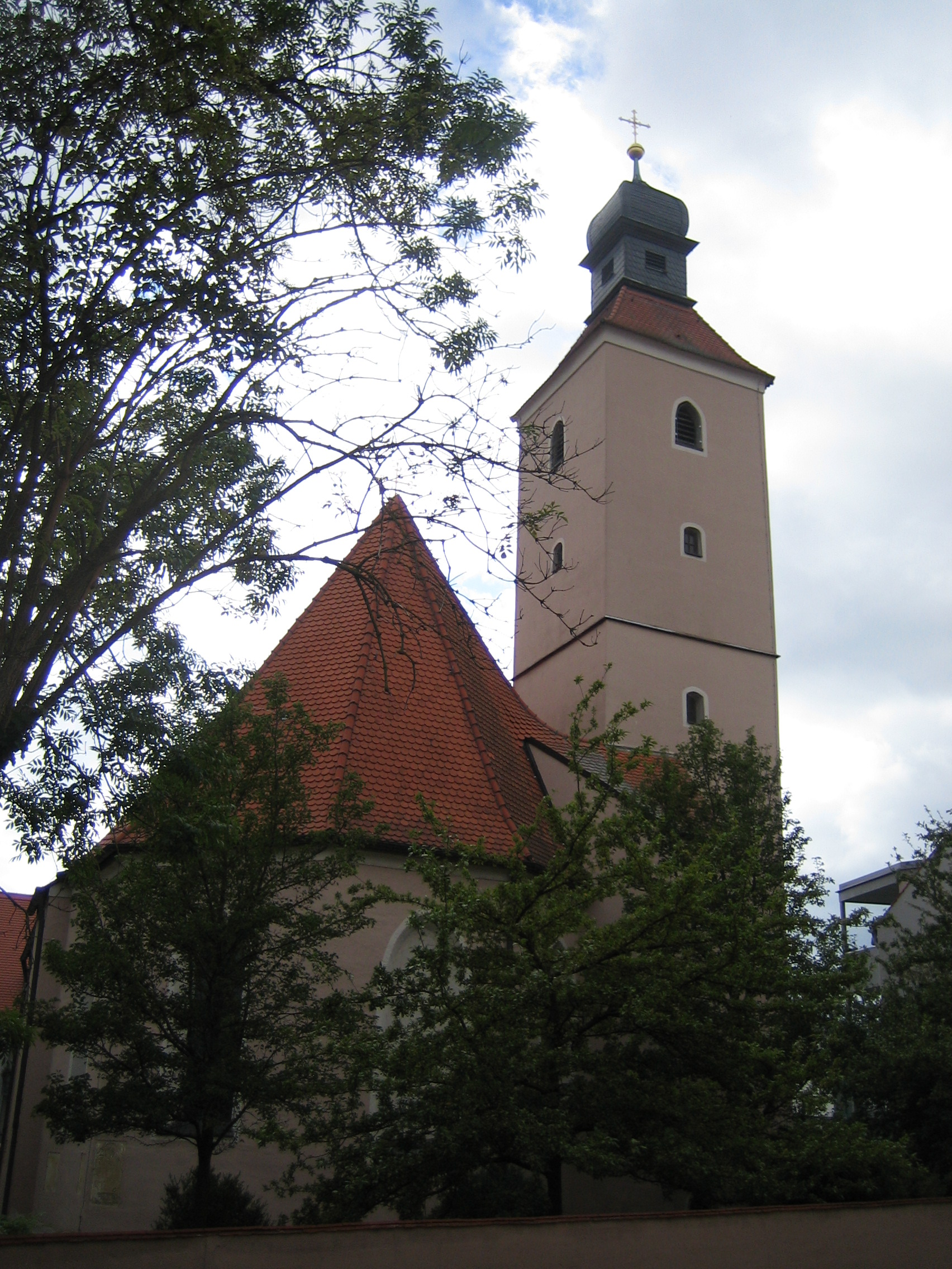 Die Sebastiankirche Ingolstadt